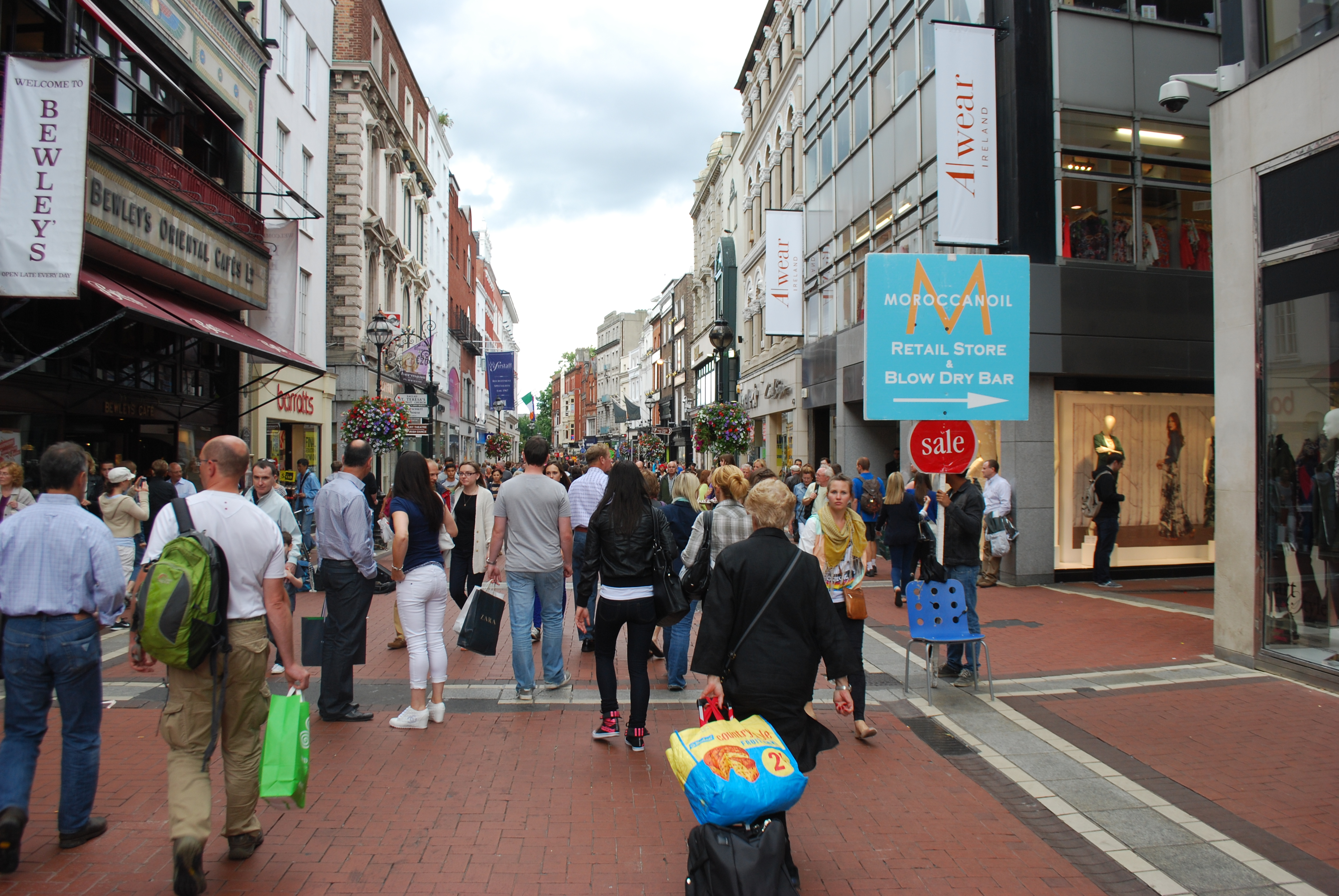 Vue de Grafton Street à Dublin.